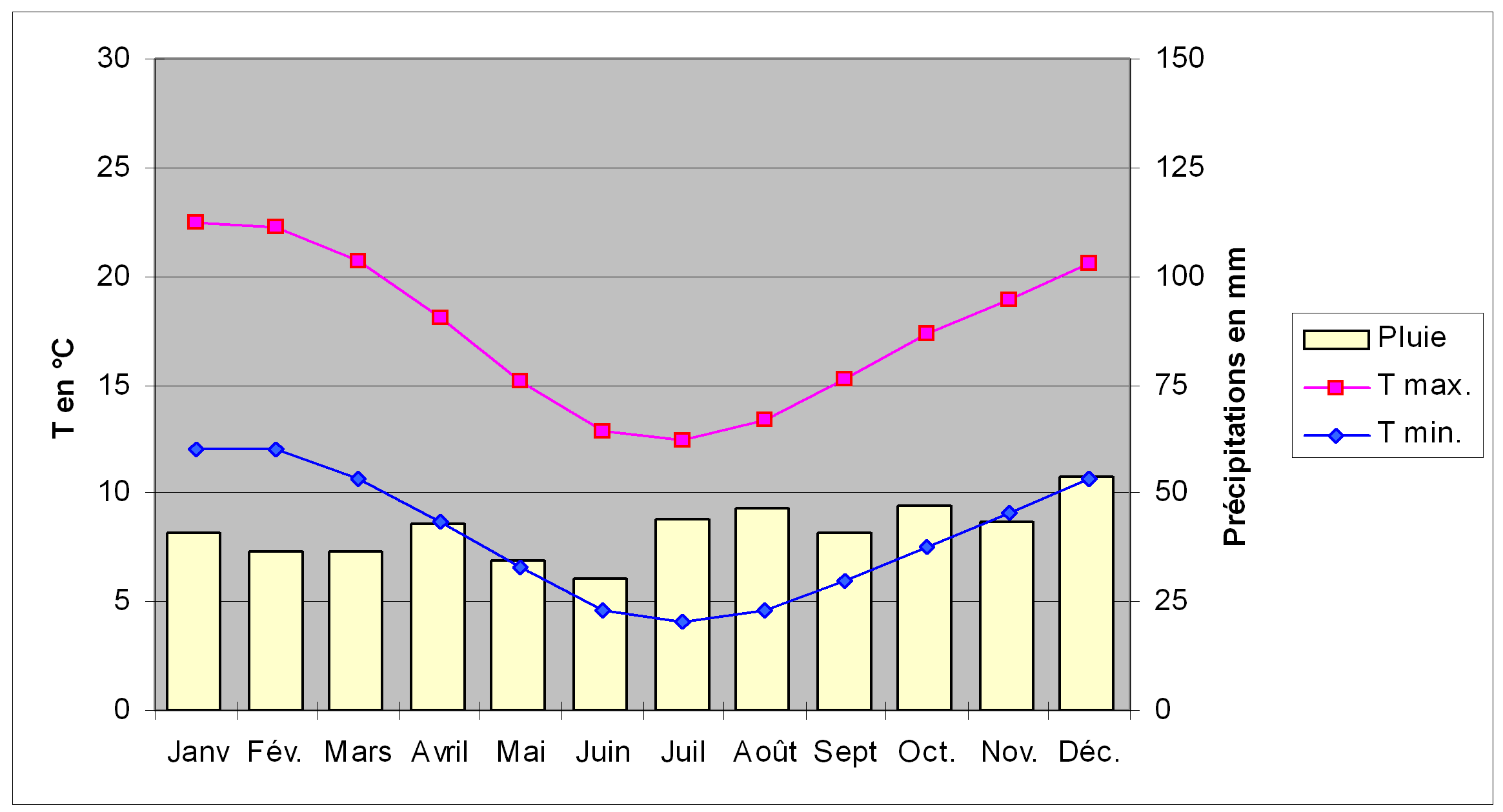 Diagramme climatique de la ville de Hobart (Australie), comprenant deux courbes, représentant les températures maximales et minimales, et un histogramme, représentant la pluviométrie, pour les douze mois de l'année.